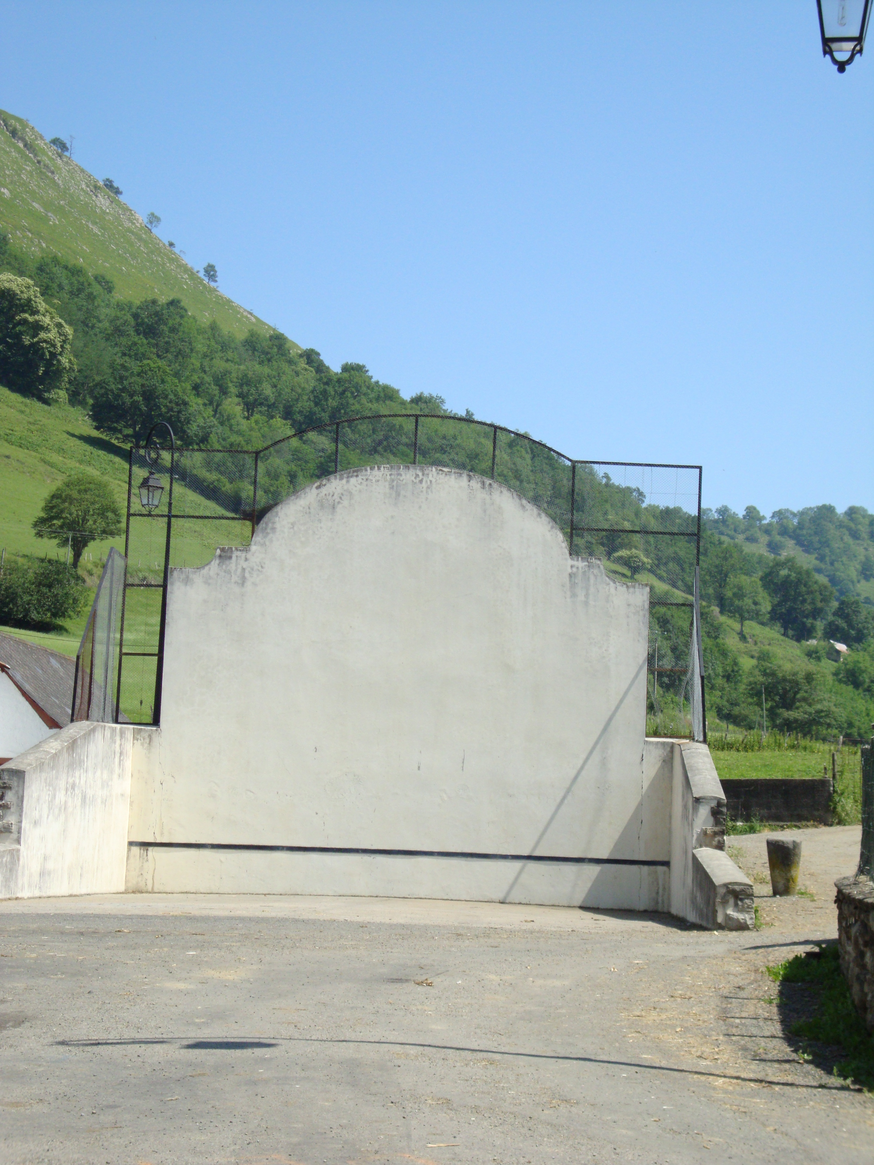 Haux (Pyr-Atl, Fr) Pelota court.